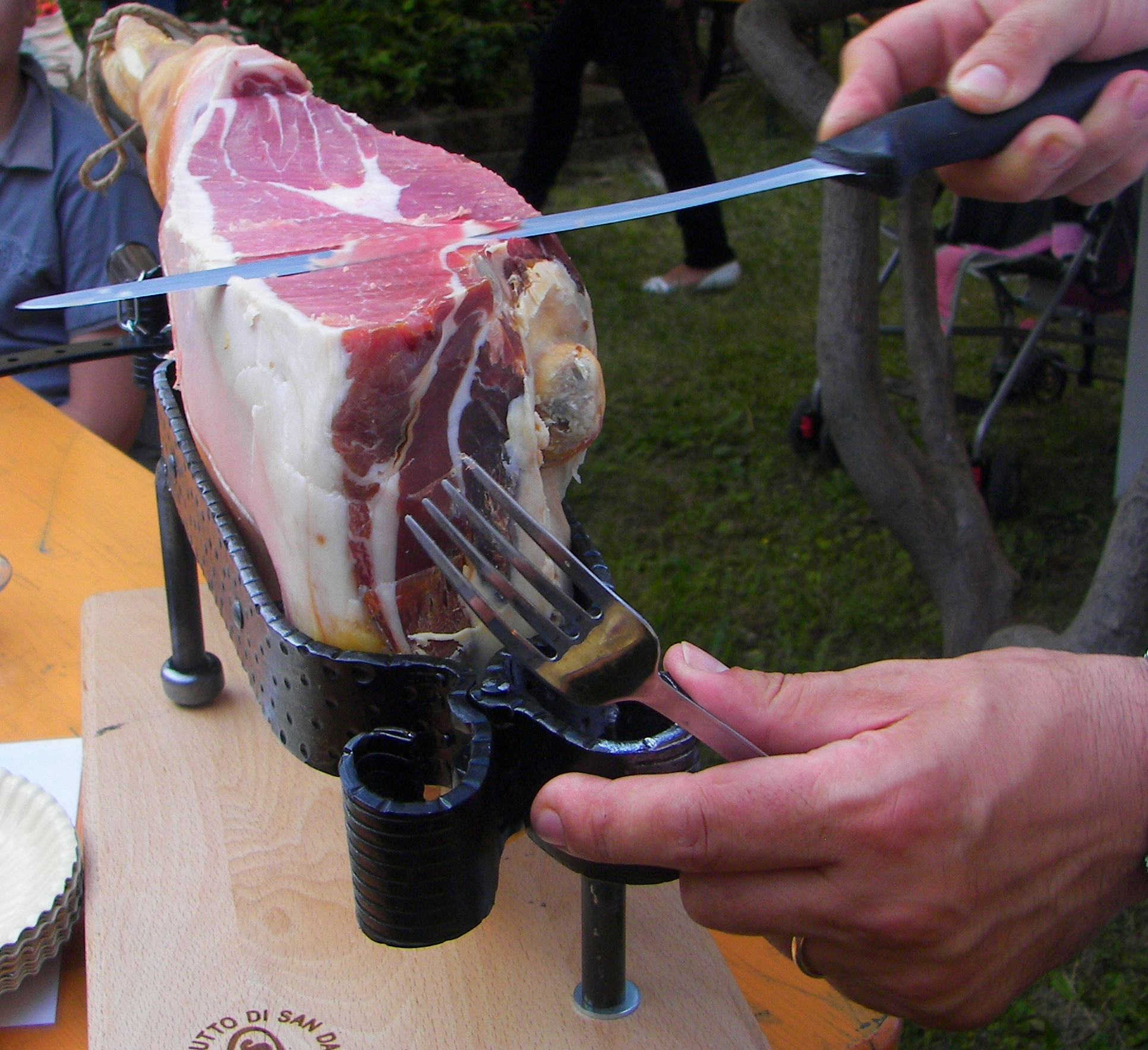 San Daniele Schinken